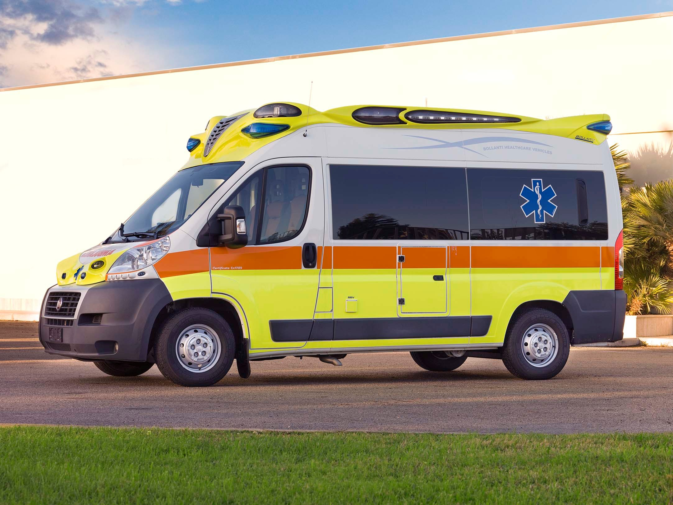 Ambulanza utilizzata in Italia e rispondete alle nuova norma Europea EN 1789